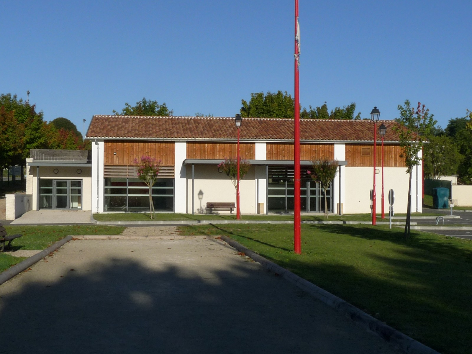 Salle des fêtes, Salignac, Charente-Maritime, France